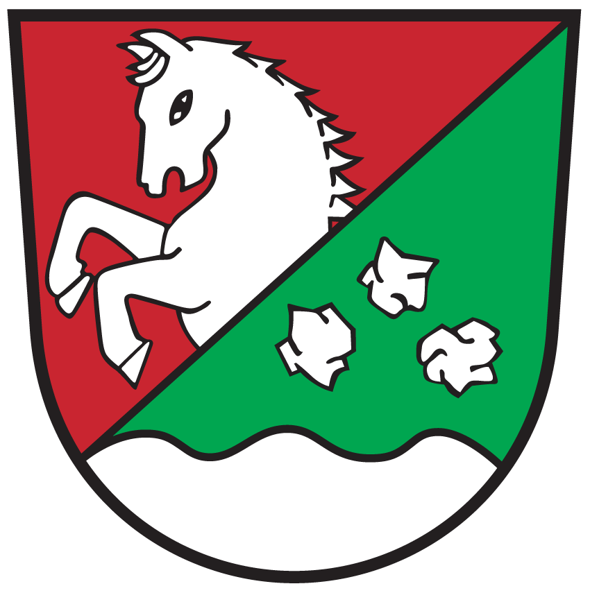 Wappen von Sankt Stefan im Gailtal